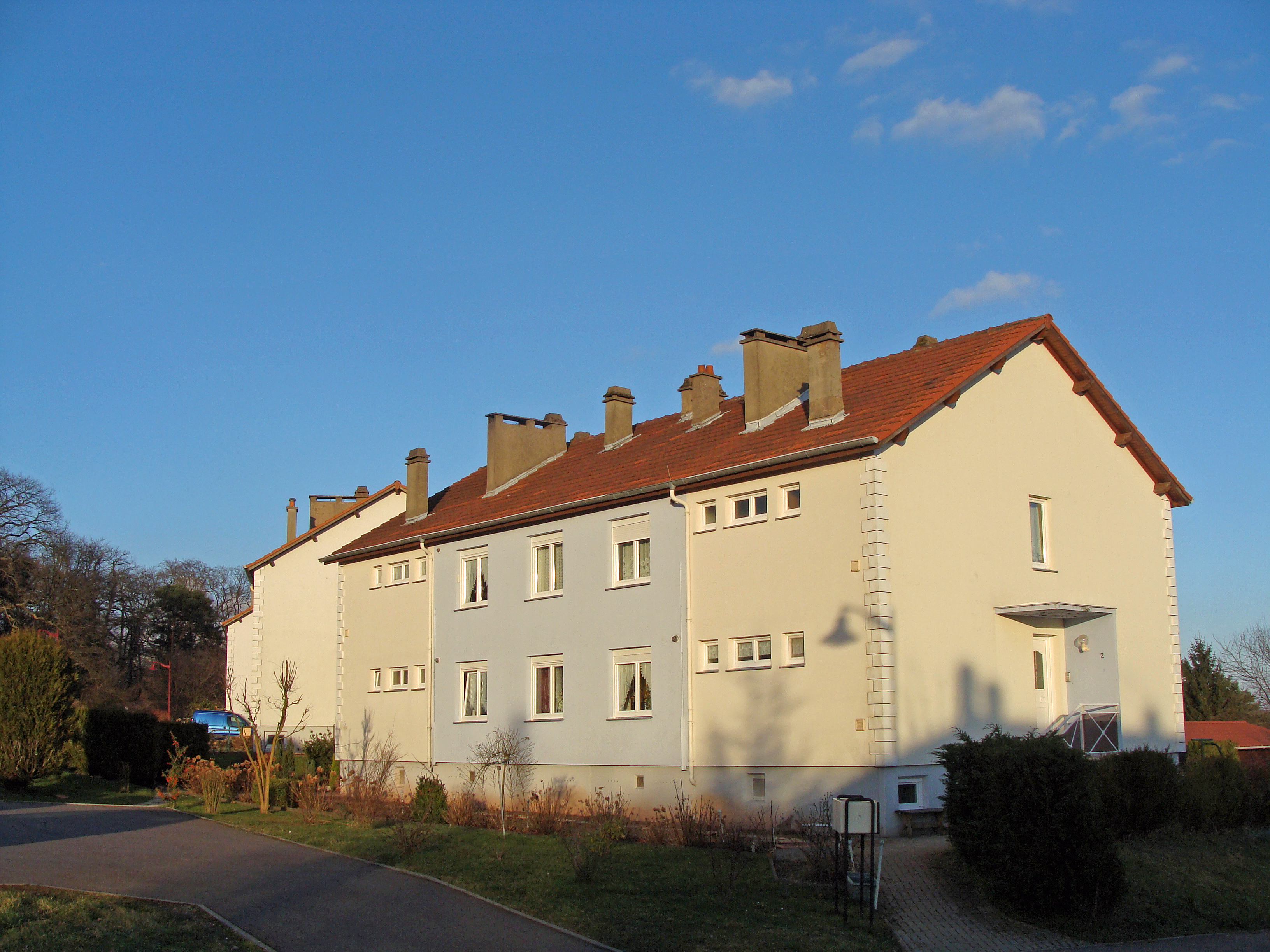 Cité minière "La Colline" de L'Hôpital (Moselle) fondée en 1946. Vue d'immeubles prise le 17 février 2014.